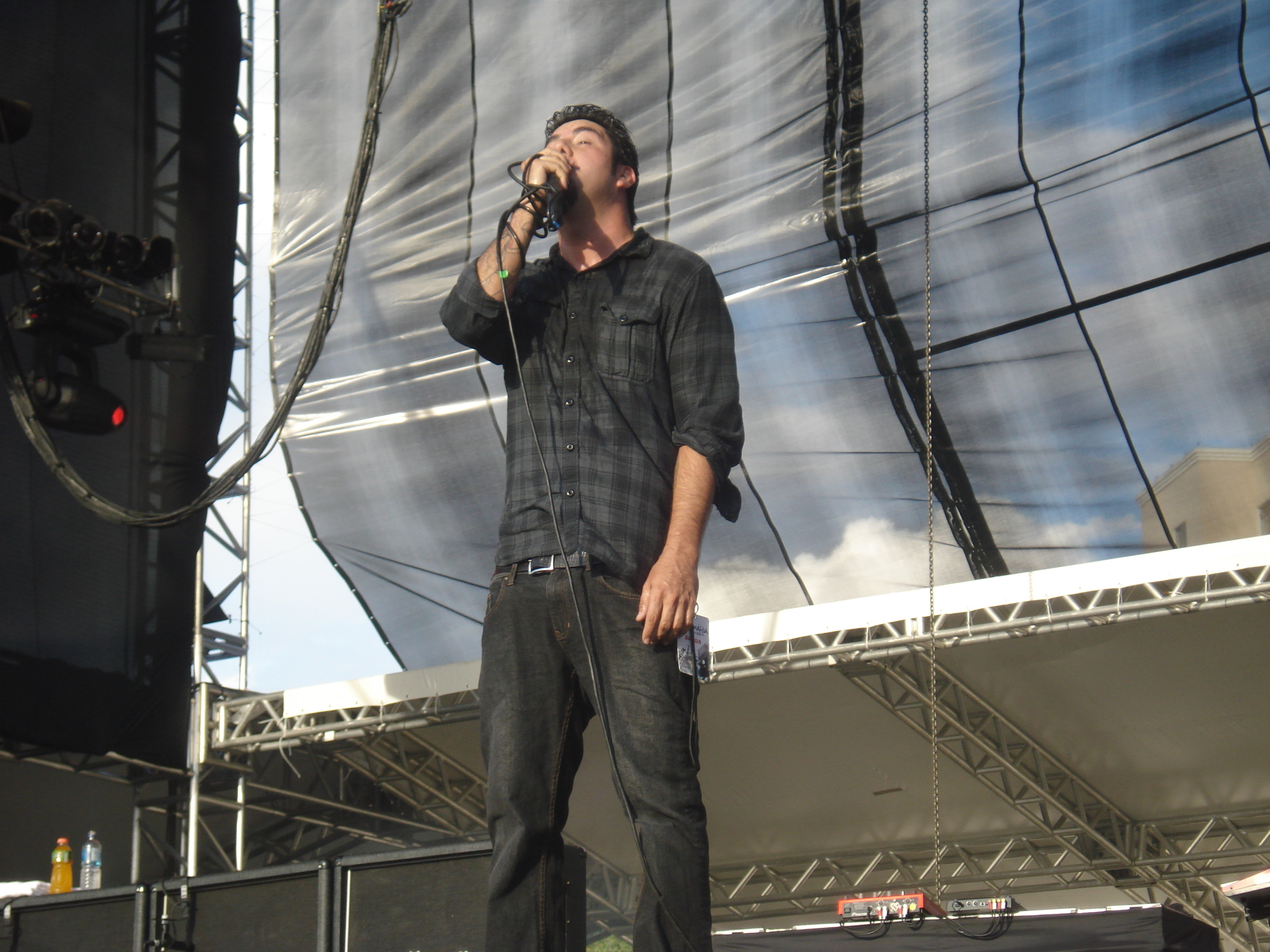 Maquinária Festival 2009 (São Paulo) - Deftones Concert